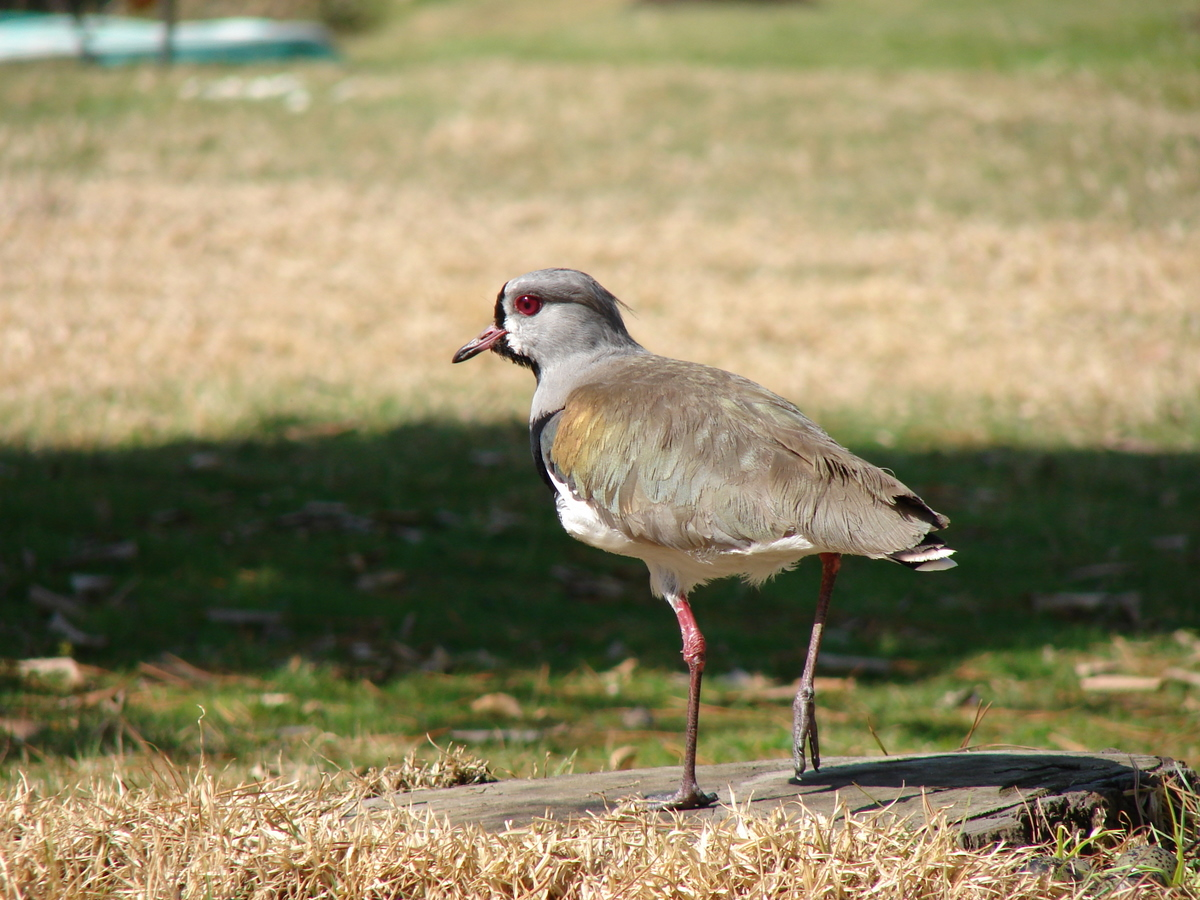 Vanellus chilensis Photo. Fotografia tomada en Santiago de Chile. ESO Vitacura. Por Hernan Fernandez